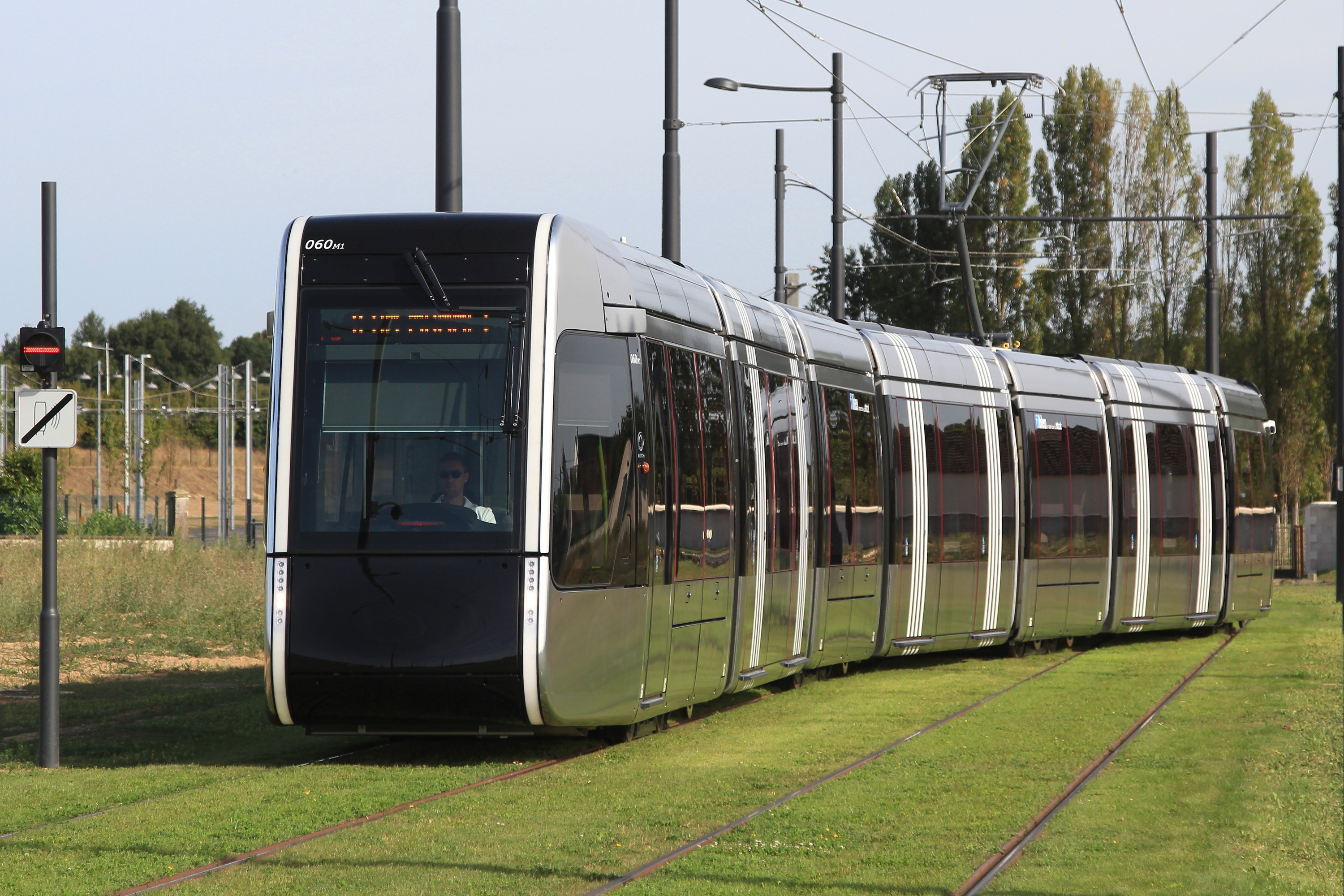 La rame de tramway Citadis n°60 fait demi-tour au terminus nord de la ligne de tramway (Vaucanson).